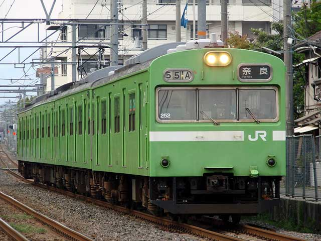 JR西日本 103系（東福寺－稲荷）